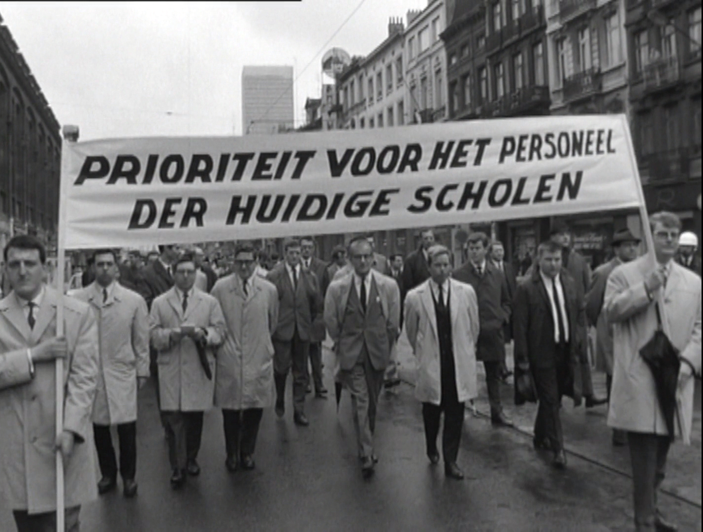 De ingenieurs en studenten van het Hoger Technisch onderwijs verzetten zicht tegen de plannen van de ministers van Onderwijs P. Vermeylen en A. Dubois voor het invoeren van een derde ingenieurstitel en eisen de rangschikking van hun studies in de hoogste graad van het technisch onderwijs en de juiste klassifikatie op Europees vlak.